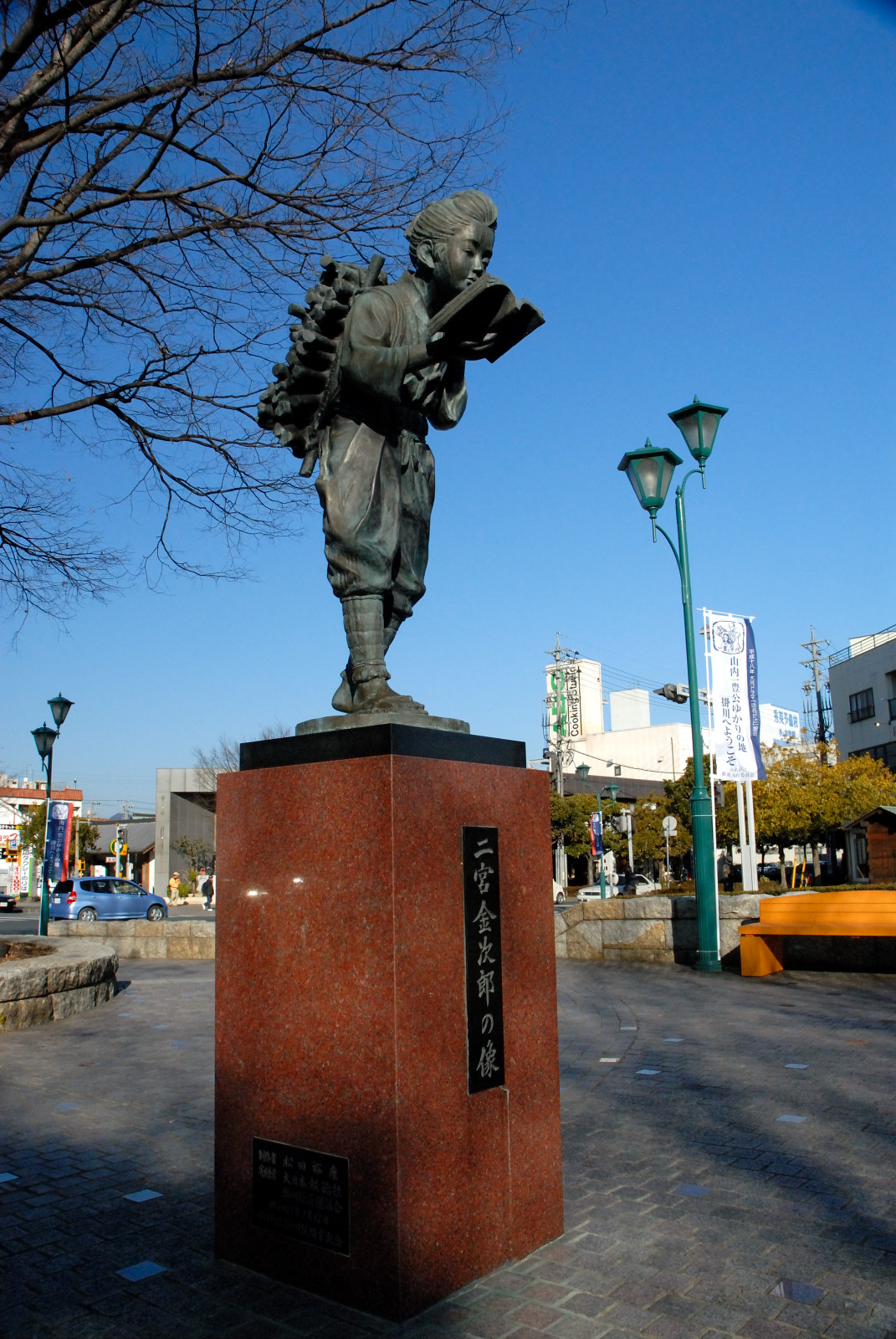 NINOMIYA Kinjiro's statue, Kakegawa, Shizuoka Japan.